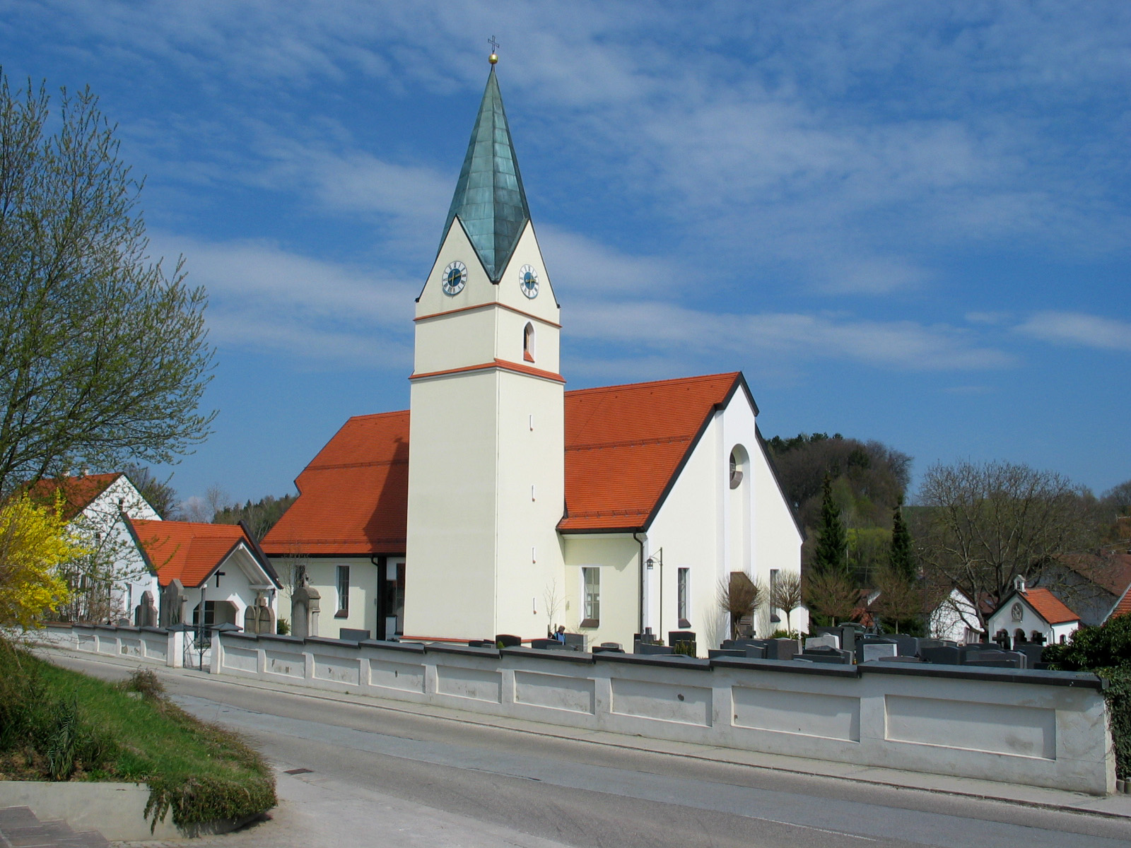 Niederhöcking, Kath. Pfarrkirche St. Martin.